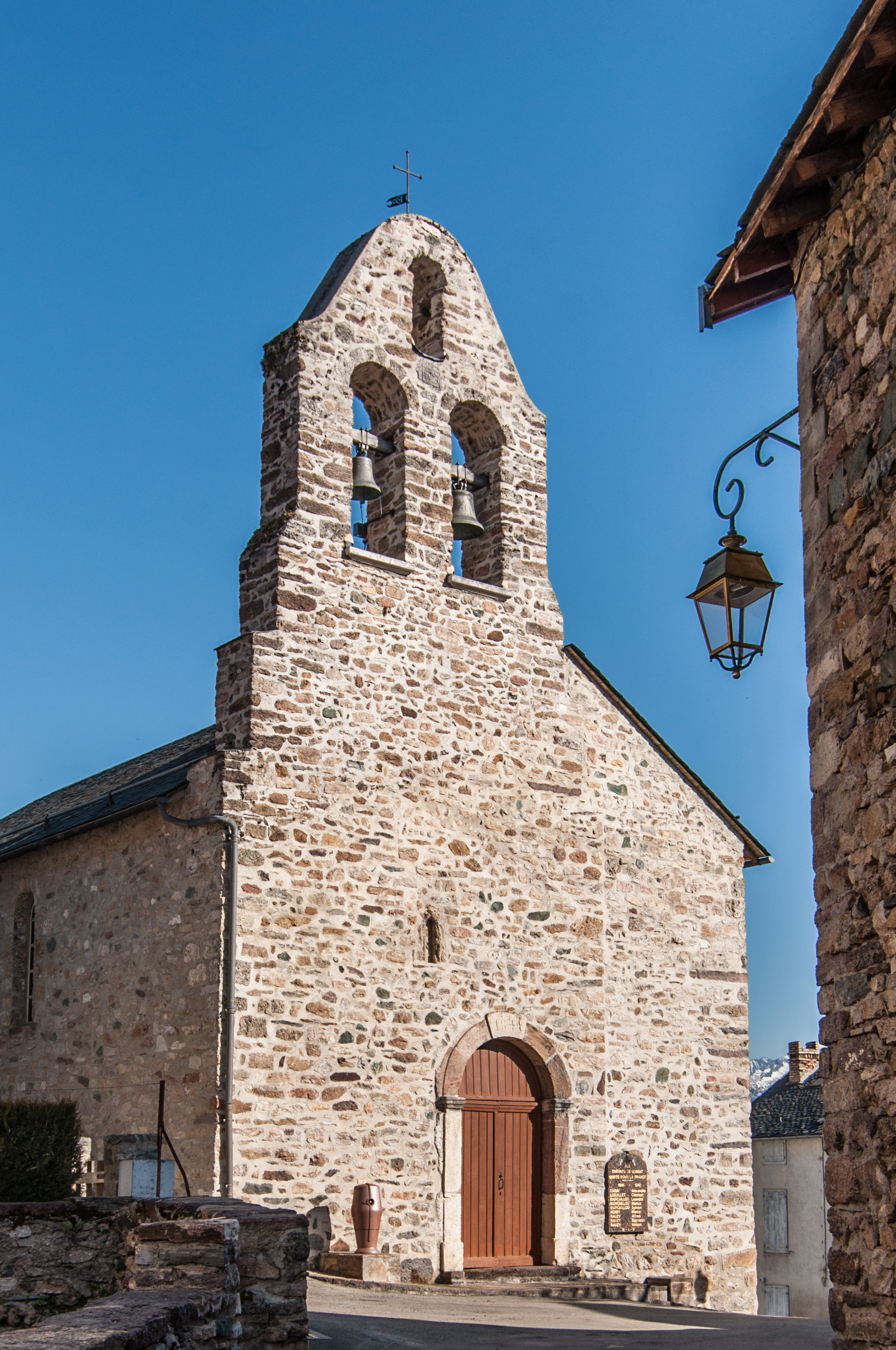 église de Lordat - Ariège (09), France